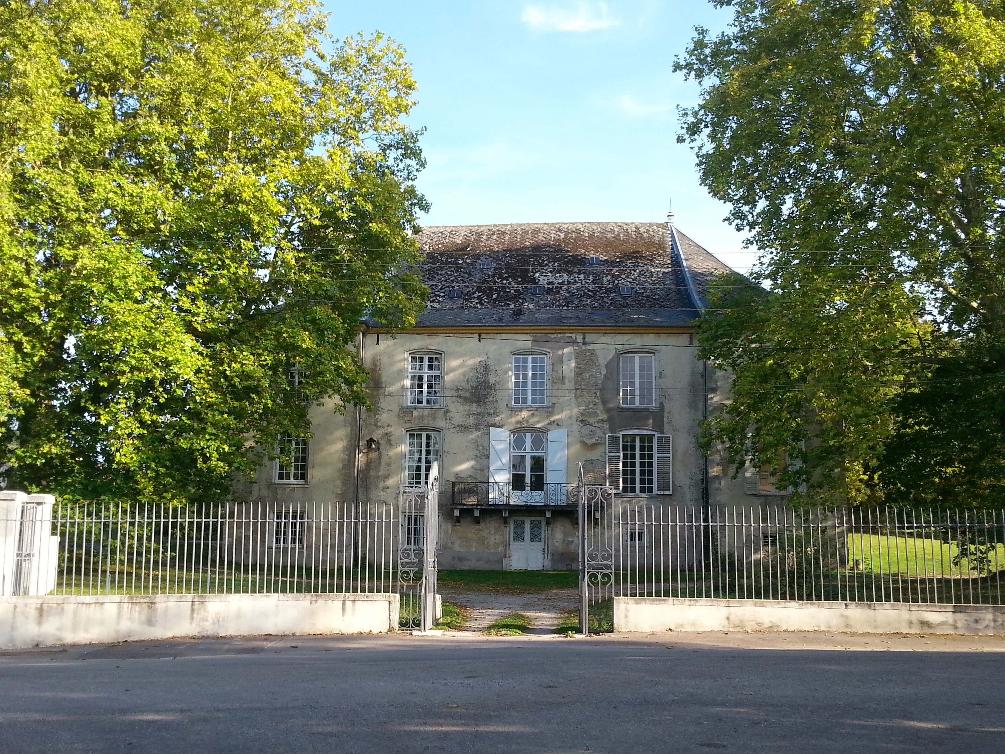 Prise de vue du château de Lupcourt (54210), datant du début du XVIIIème siècle